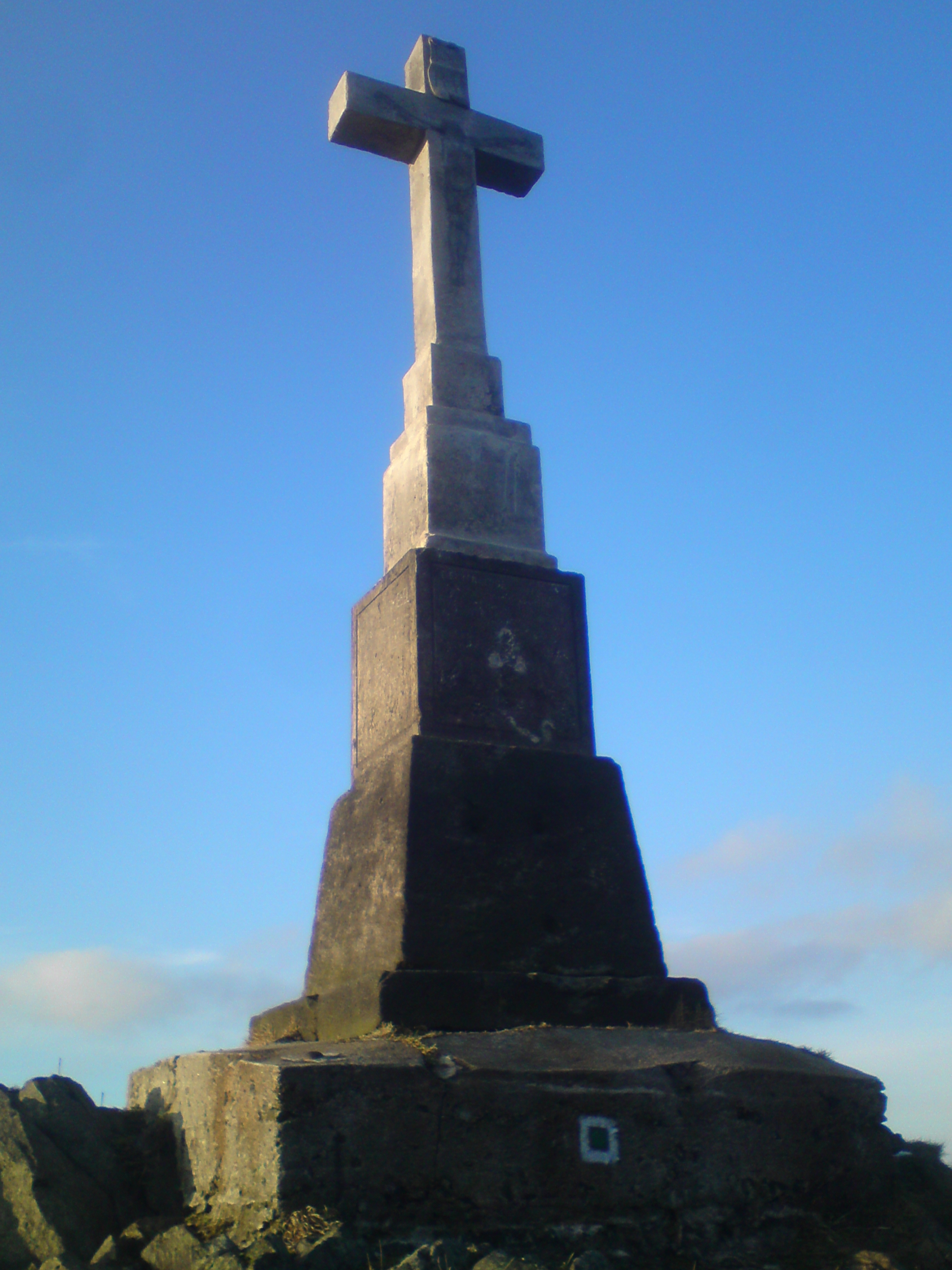 restauriertes Bergkreuz auf dem Sattelberg (Špičák u Krásného Lesa)